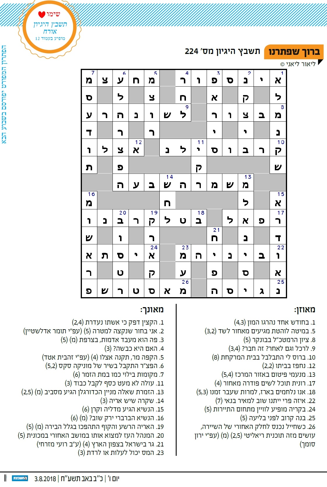 תשבץ היגיון שפורסם בחוברת 'המשבצת' של מעריב באוגוסט 2018